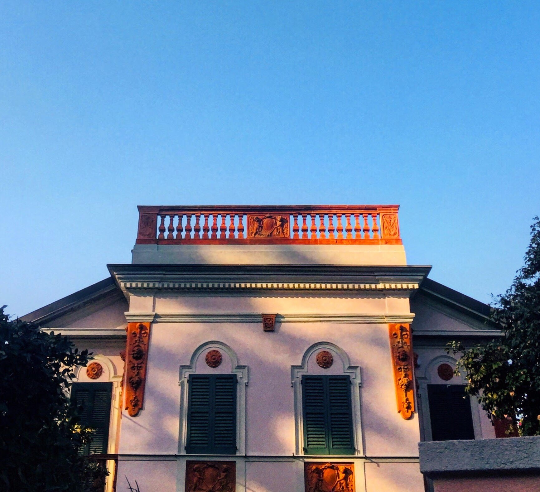 Villa Galli - Gatti Grami in Meina, sede tra Ottocento e Novecento delle famiglie Galli, notai novaresi, e Gatti Grami, oriundi di Mantova, e sede della farmacia del tenente Anselmo Gatti Grami (1881 - 1964)